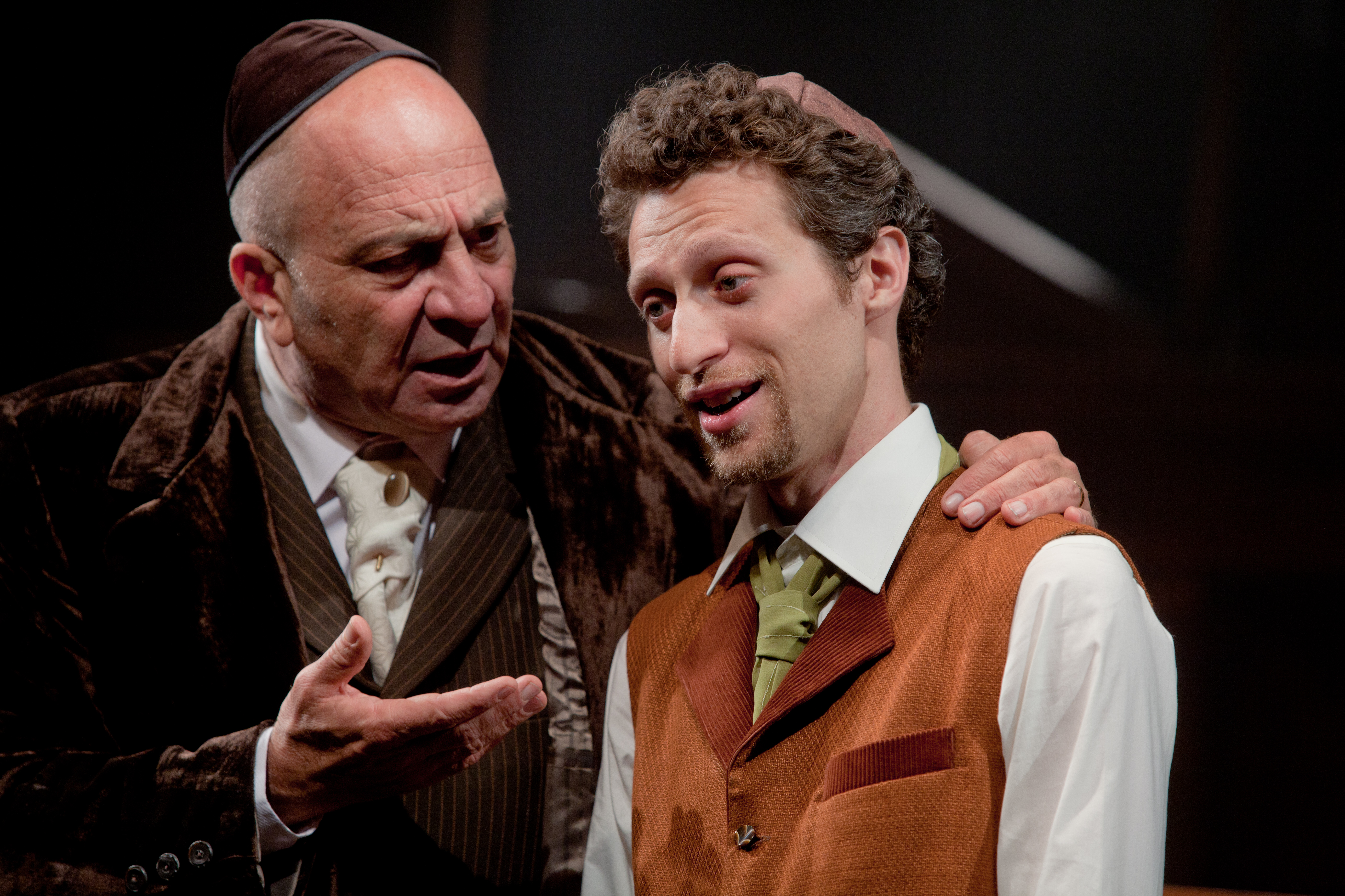 ויטלי פרידלנד ואריה צ'רנר, בהצגה "ירושלים החדשה" בבימויו של סיני פתר, תיאטרון החאן, 2012